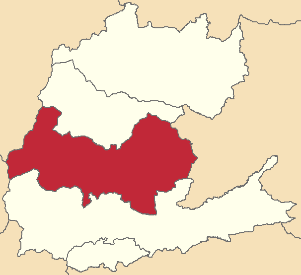 Mapa localizacor del cantón en Napo, Ecuador